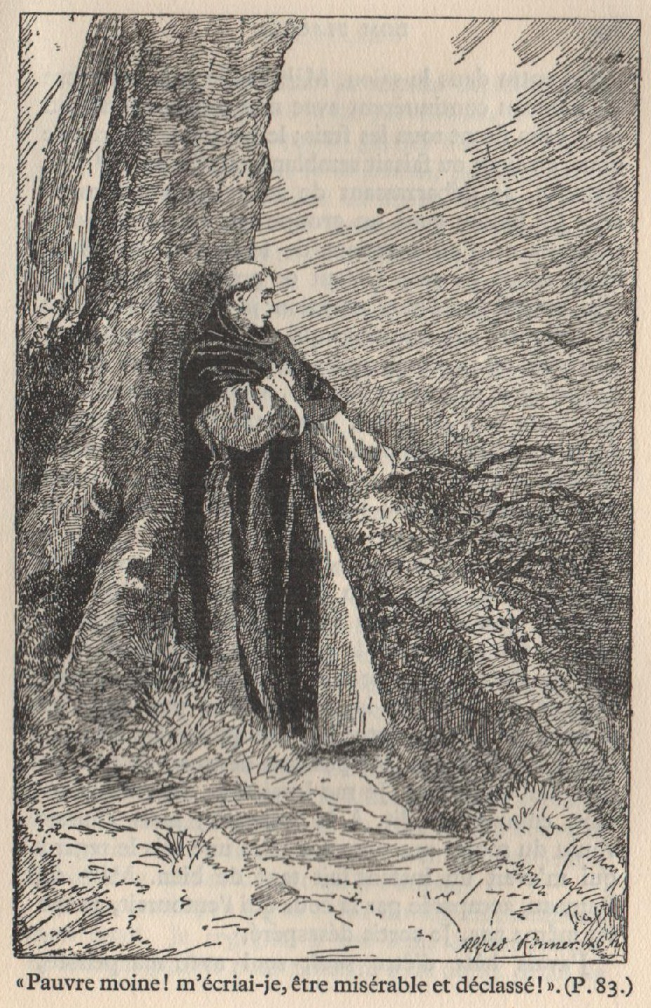 Illustration du live (1934) "Dom Placide, mémoires du dernier Moine de l'abbaye de Villers (-la Ville) " (Belgique) dessins de Alfred Ronner (1851-1901)